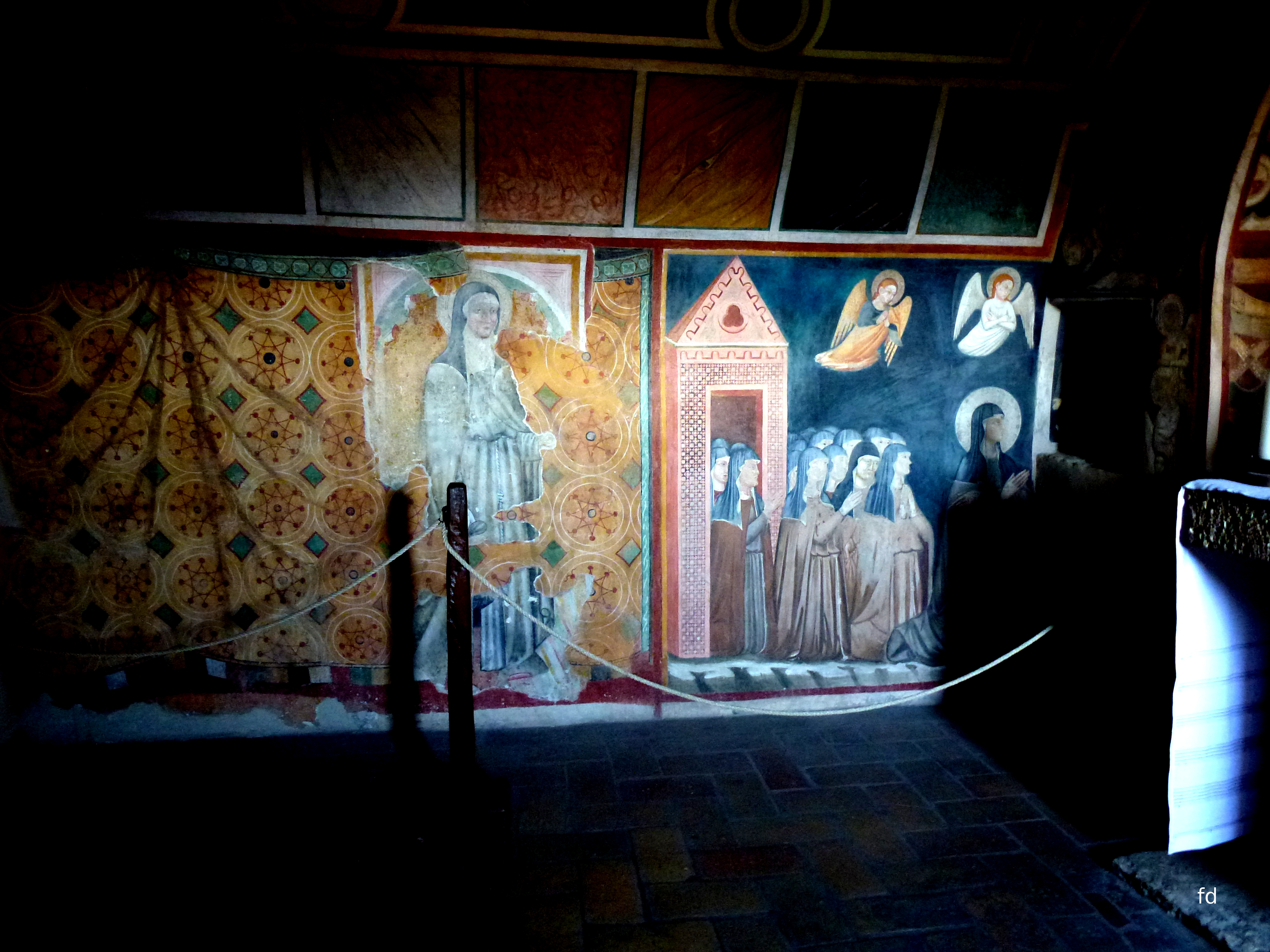 Kloster San Damiano Wandmalerei.